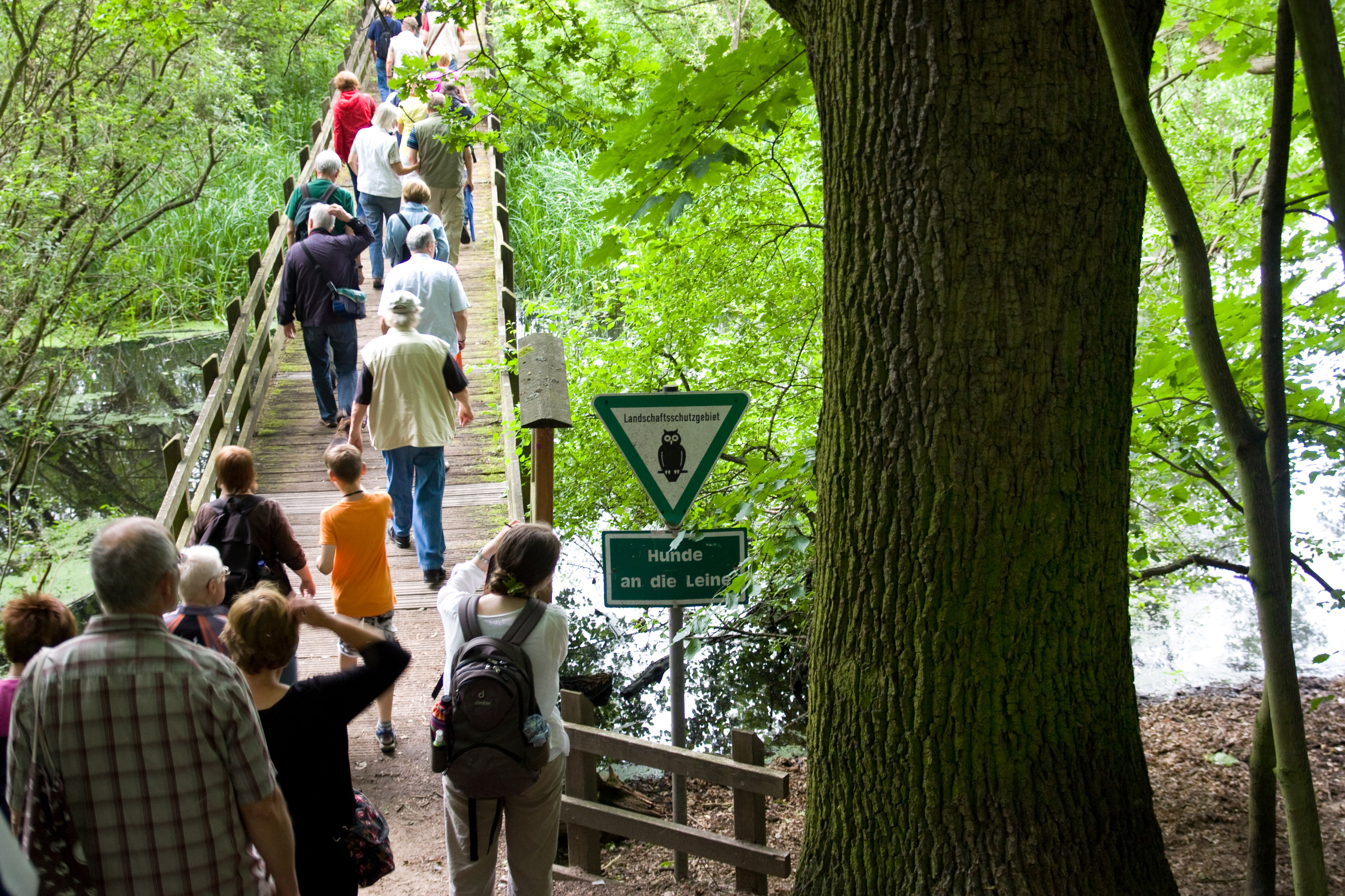 Naturführung im Rahmen des Langen Tags der StadtNatur 2013 in Spandau-Tiefwerder